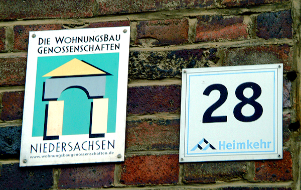 Erst im Zusammenhang gelesen ergeben die Schilder an der Badenstedter Straße 28 , daß die Wohnungsgenossenschaft Heimkehr eG offenbar Mitglied der Wohnungsbaugenossenschaften Niedersachsen ist ...